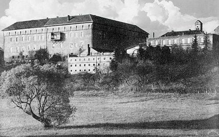 Deutschordensburg in Ragnit